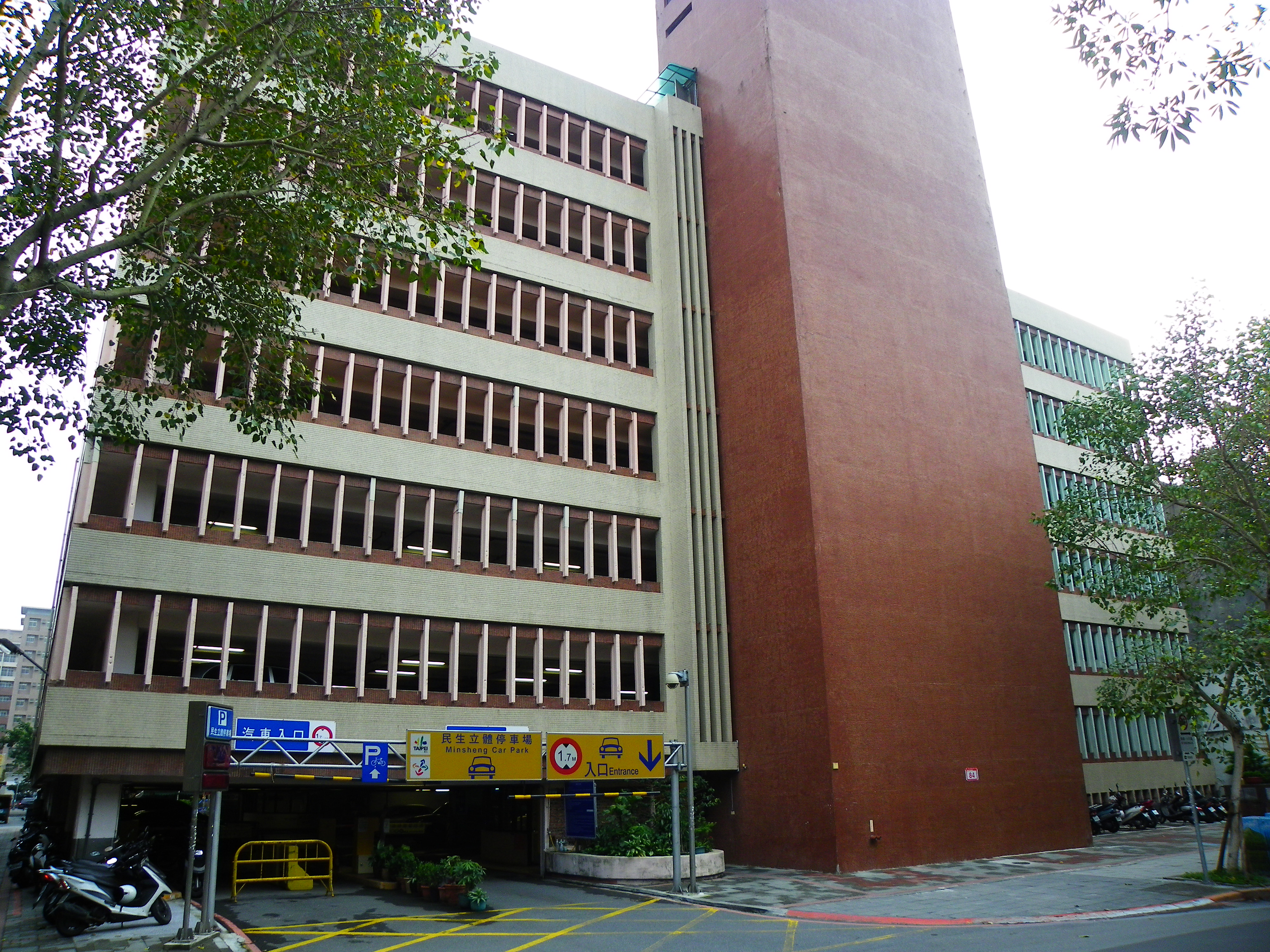 台北市民生立体駐車場、所在地：台北市松山区民生東路五段84号。